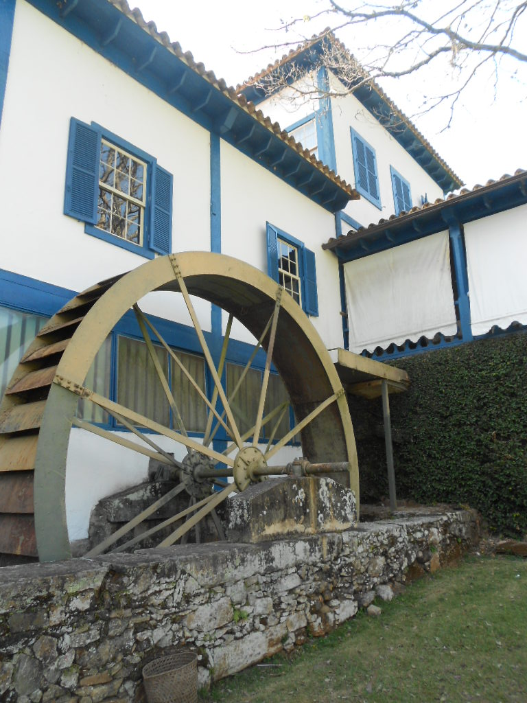 Casarão da Fazenda do Ciclo do Café, em estilo neocolonial mexicano, Barra do Piraí, estado do Rio de Janeiro, Brasil.